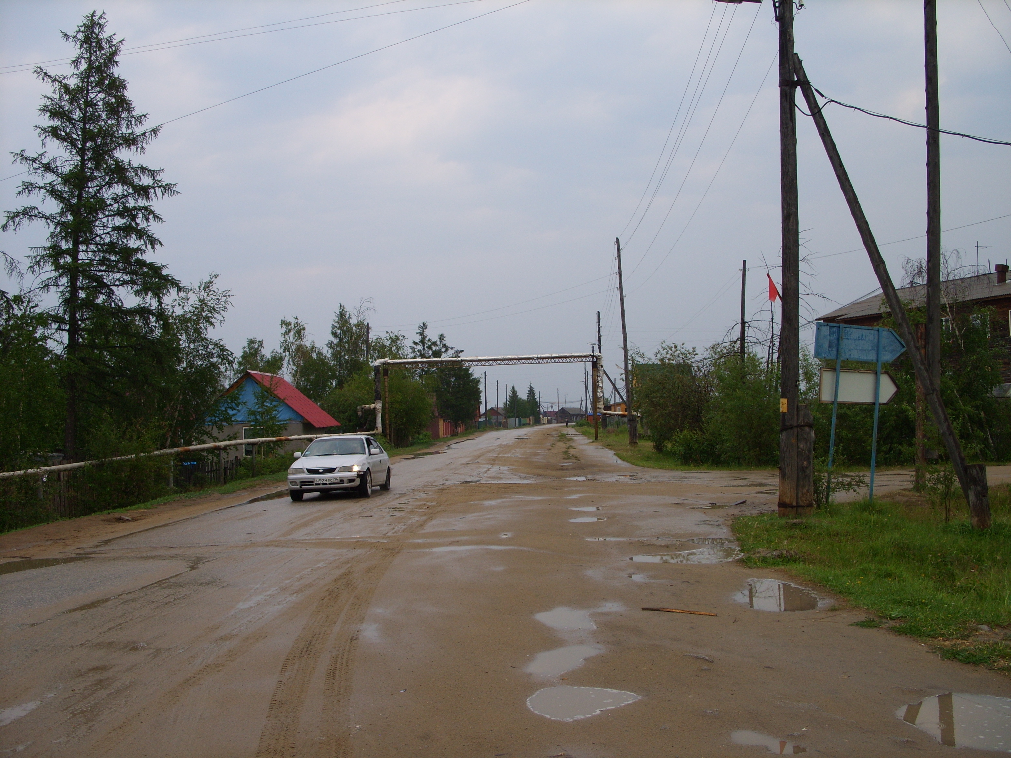 Село Маган (городской округ Якутск)